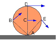 Rollend wiel met snelheden van 4 punten